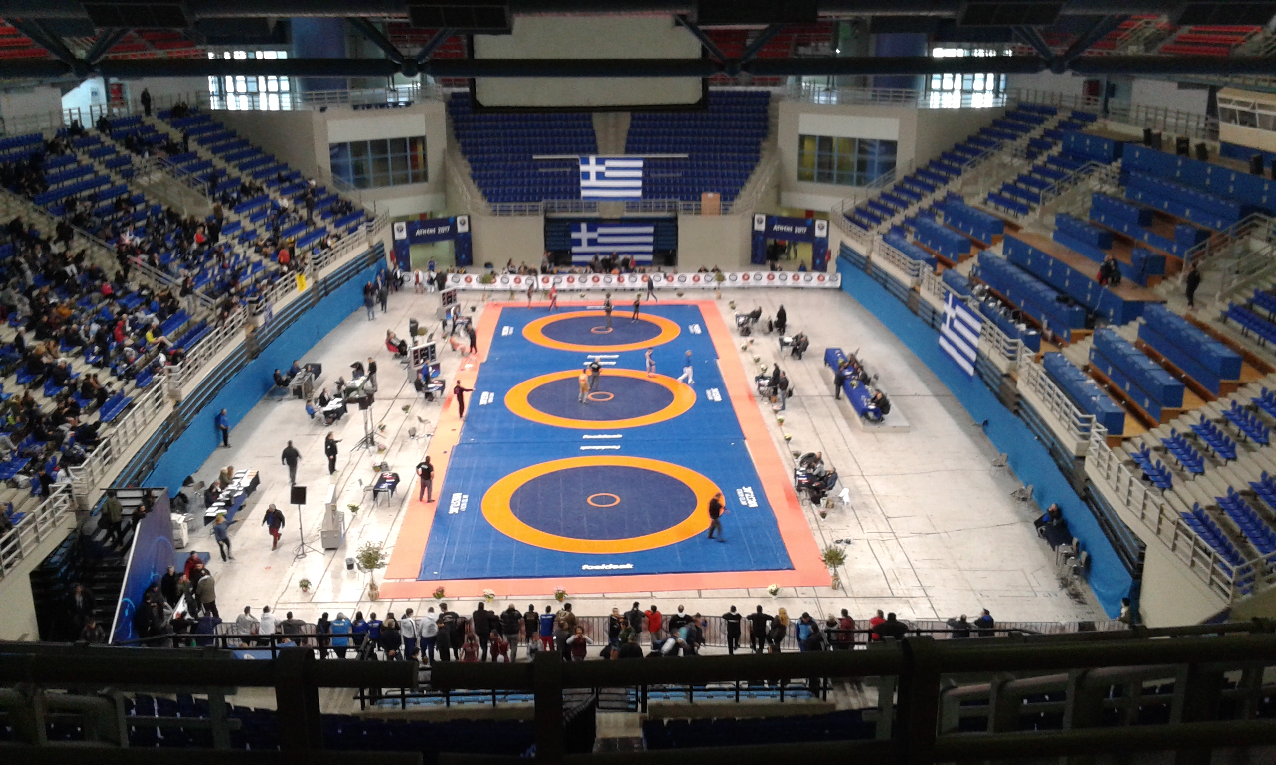 Η θέα από το ψηλότερο πάτωμα.